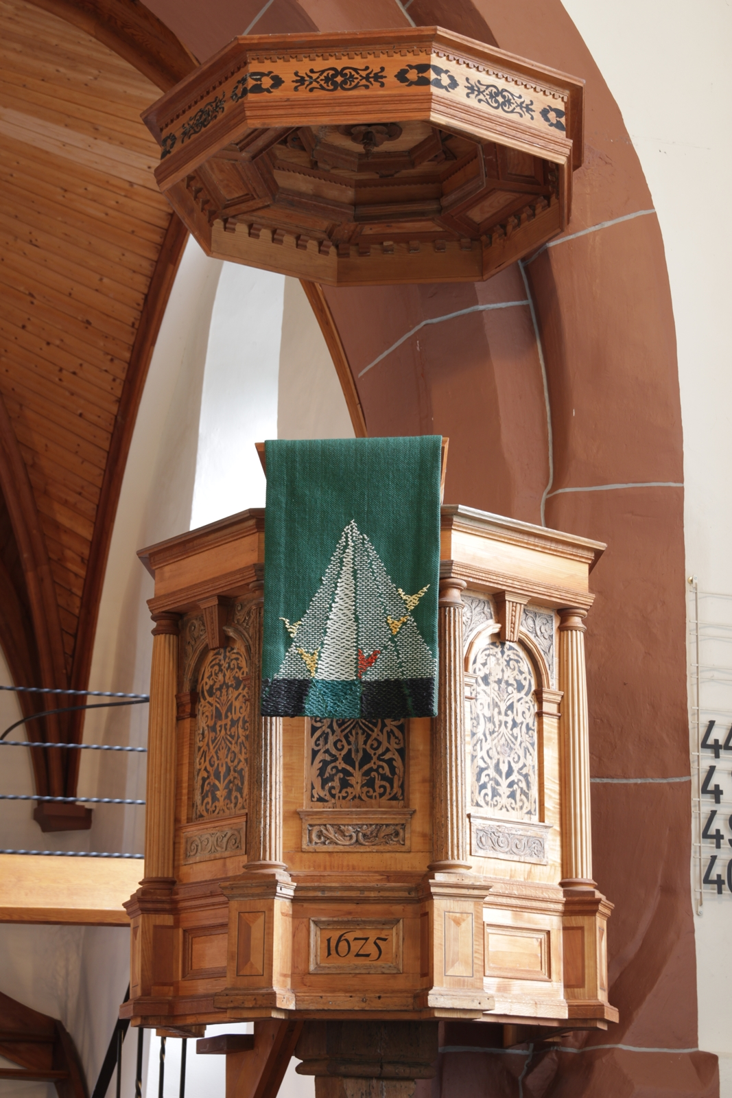 Evangelische Kirche Eichelsdorf, Nidda, Hessen, Deutschland